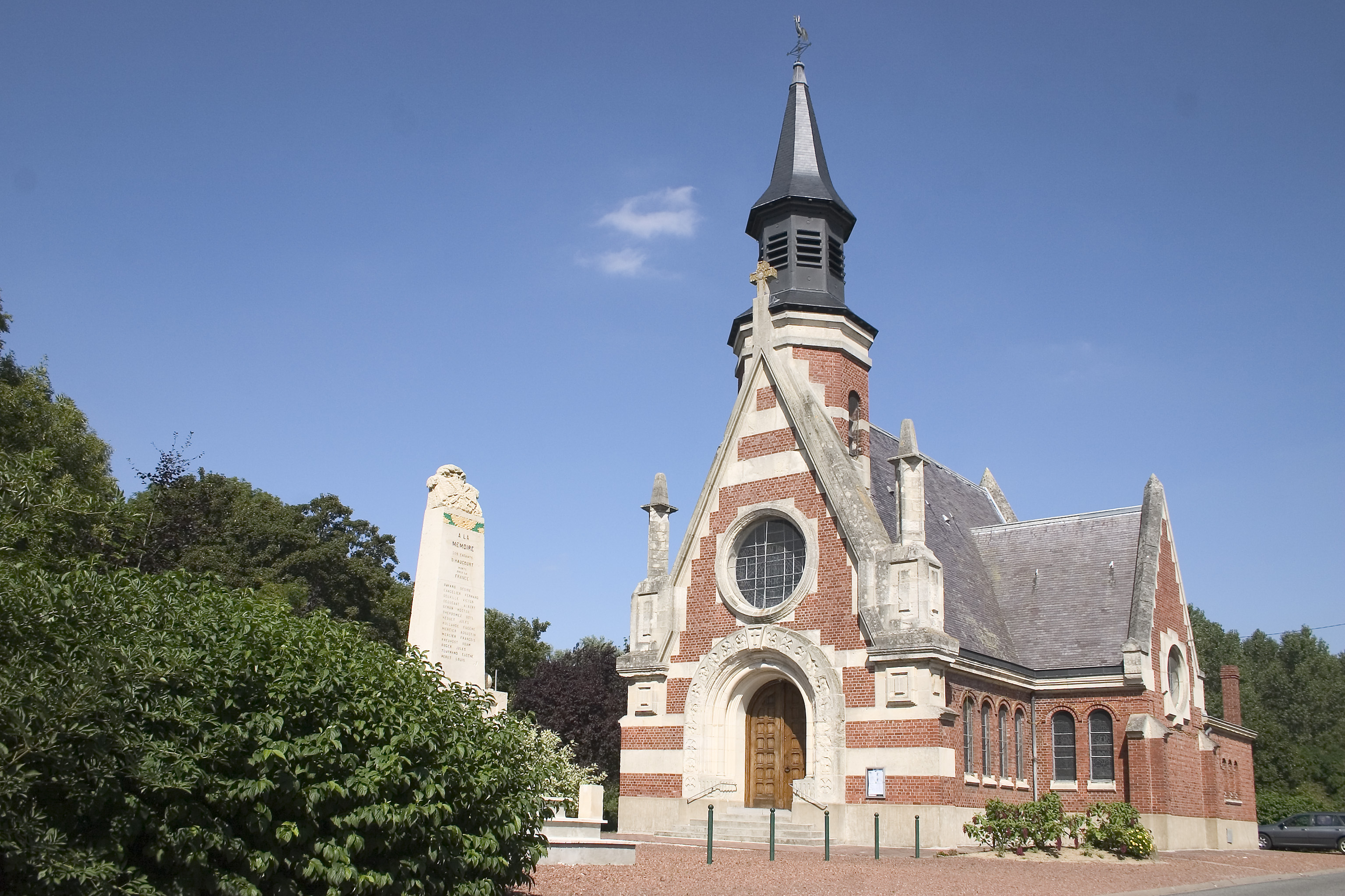 Haucourt l'église